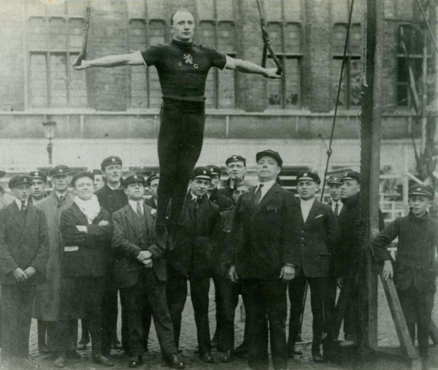 Domien Jacob, Belgian Gymnast